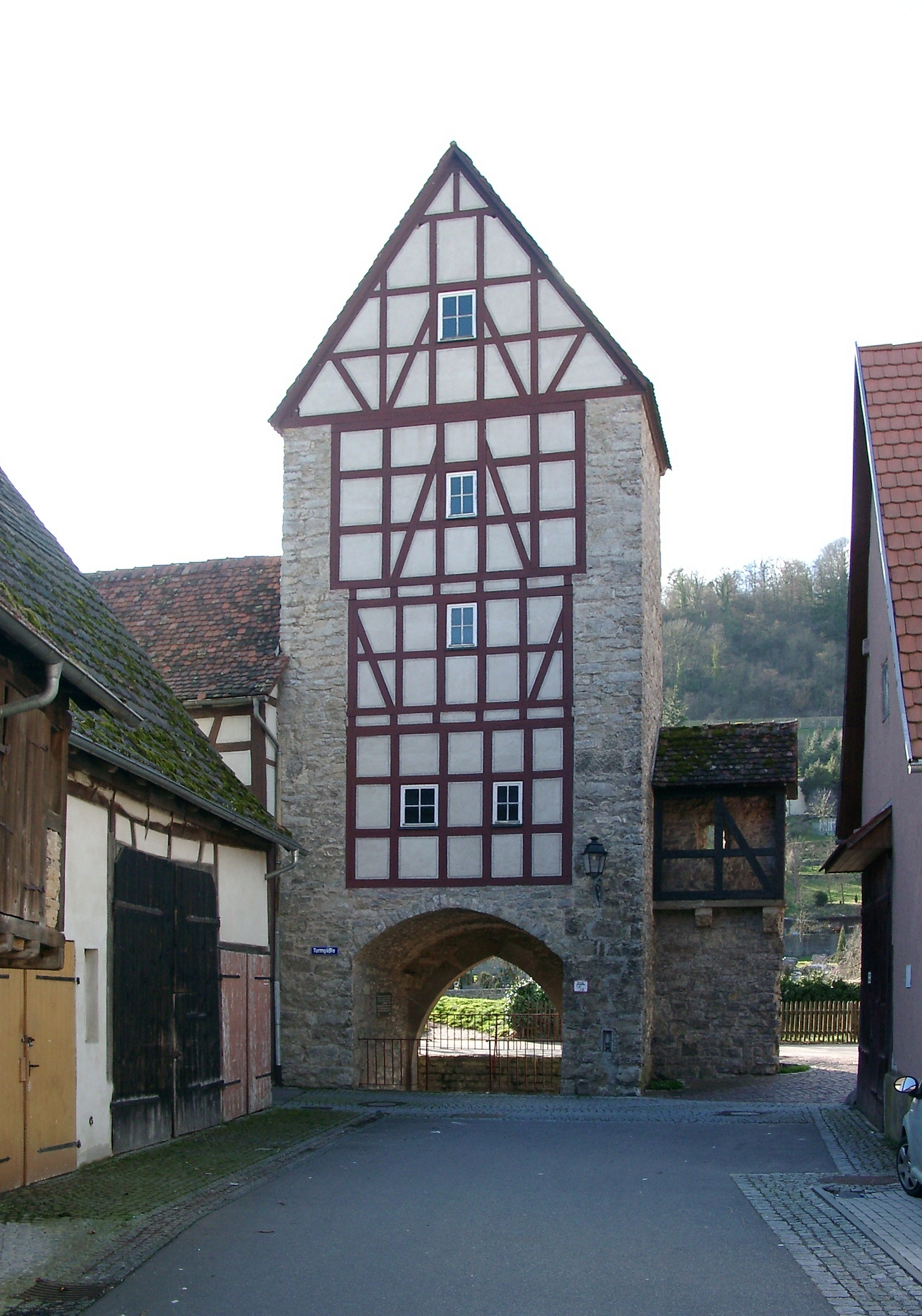 Niedernhall, Turm an der Stadtmauer mit Salztor